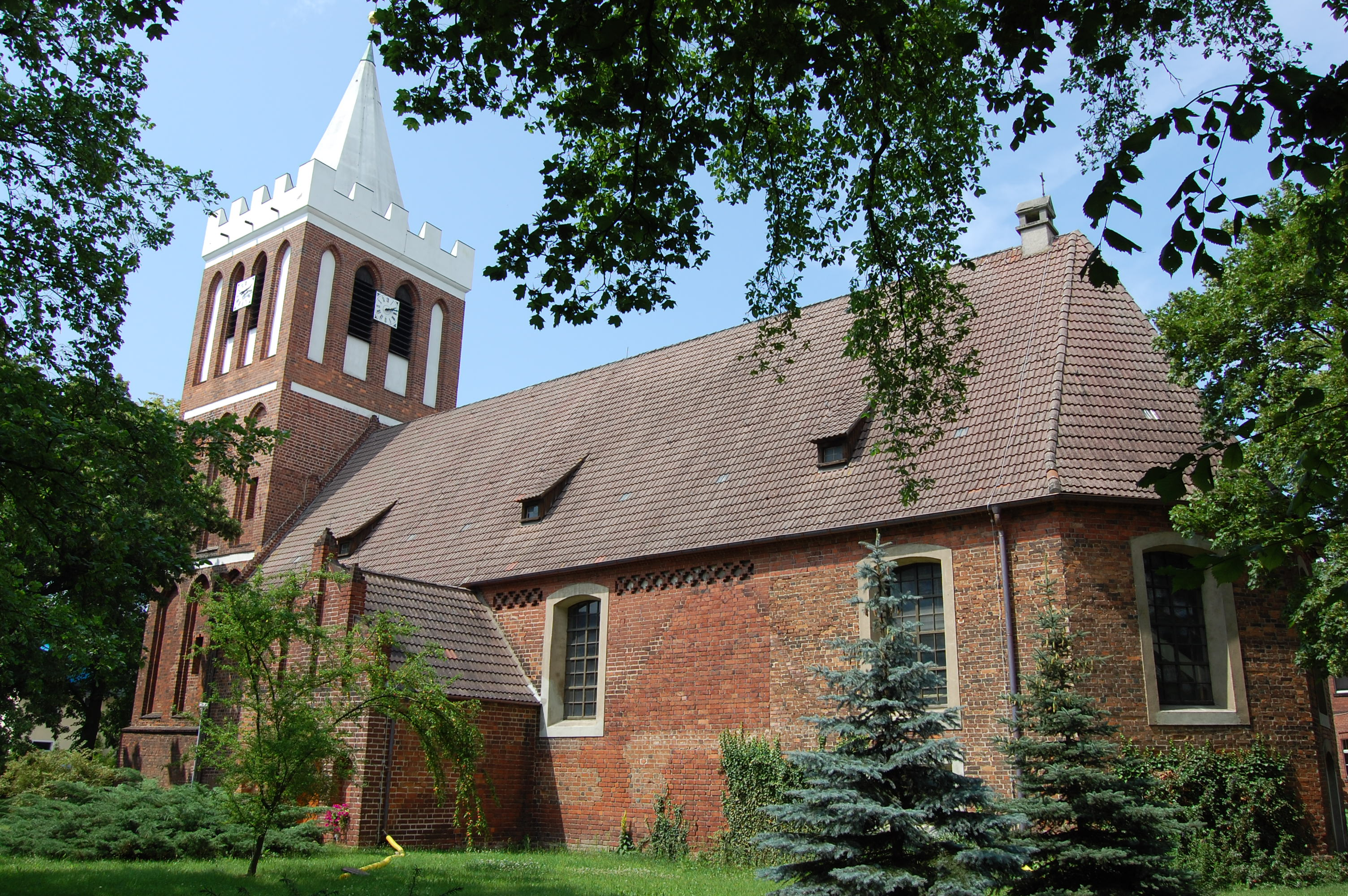 Dorfkirche Werben Spreewald Dolnoserbski: cerkwja Wjerbno